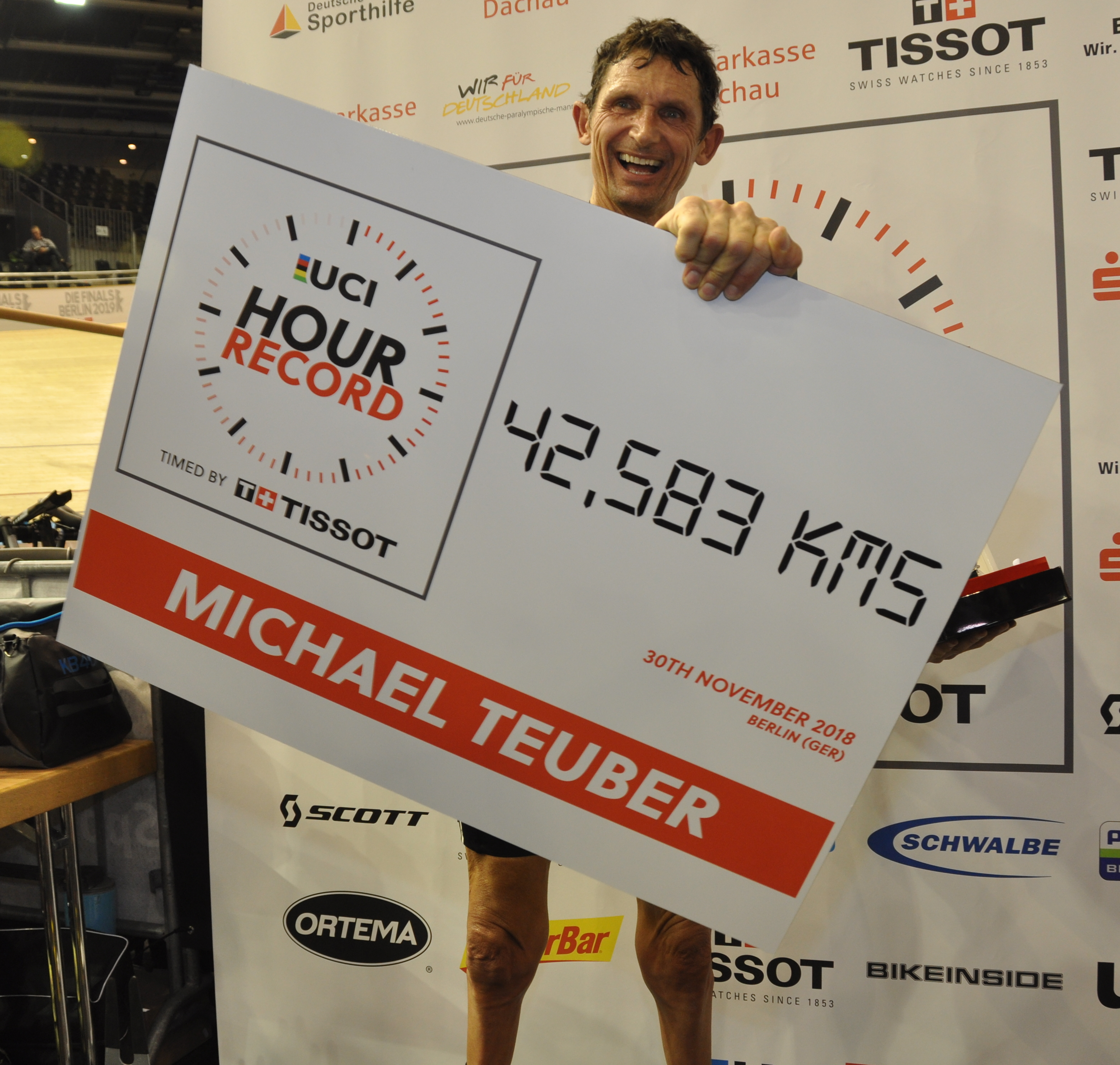 Stundenweltrekordversuch von Michael Teuber